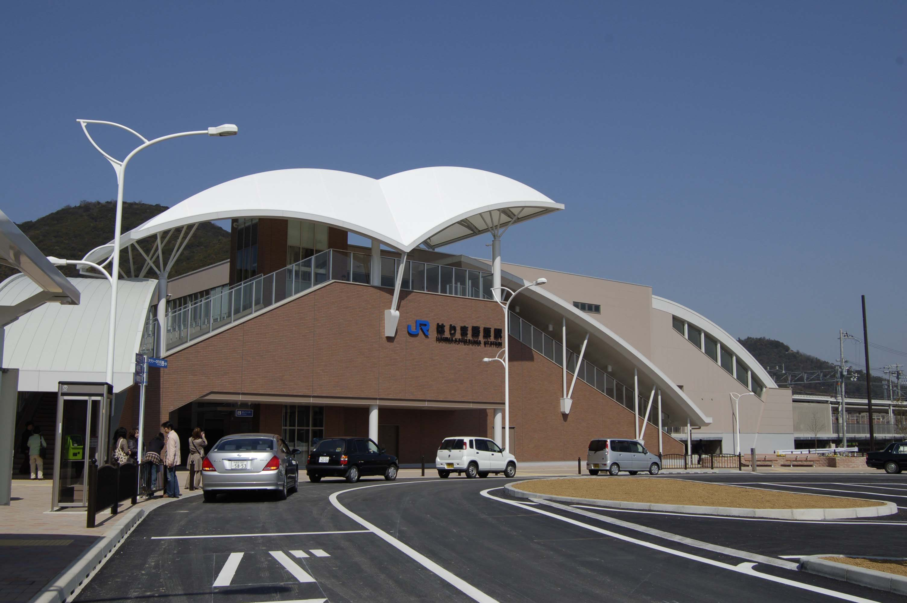 JR West Harima-katsuhara station. JR西日本 はりま勝原駅(山陽本線)。写真は開業当日のもの。